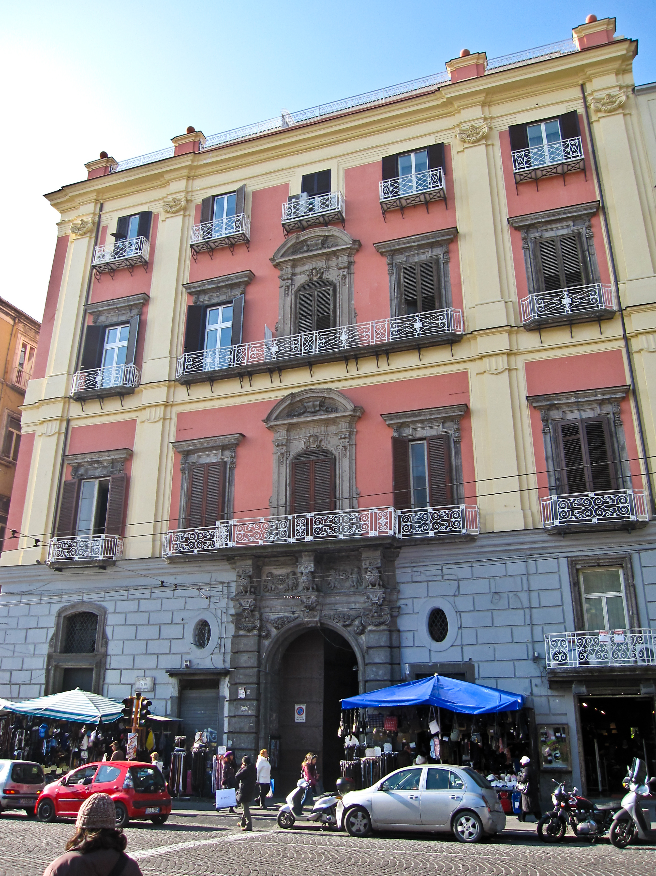 Napoli - Palazzo Ruffo di Bagnara. La facciata su Piazza Dante